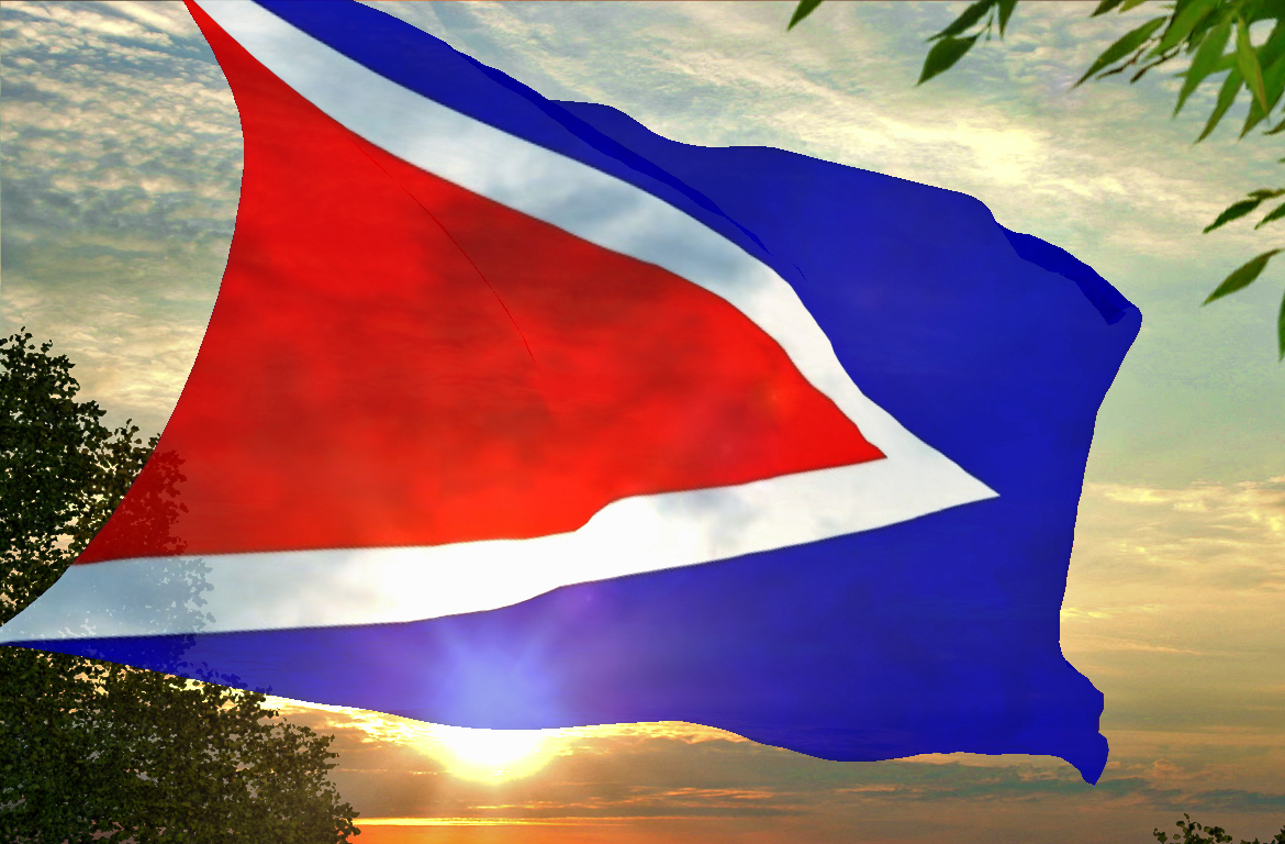 Bandera Ondeante de la Ciudad Autónoma de Cabo Rojo.